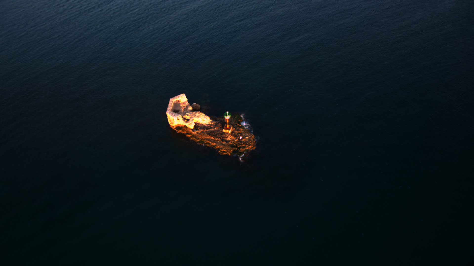 מגדל הזבובים לאחר נפילת החומה יוני 2020